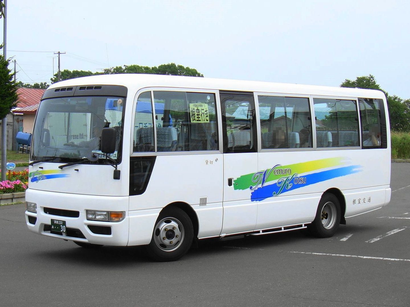 Naka-Shibetsu Airport to Nemuro